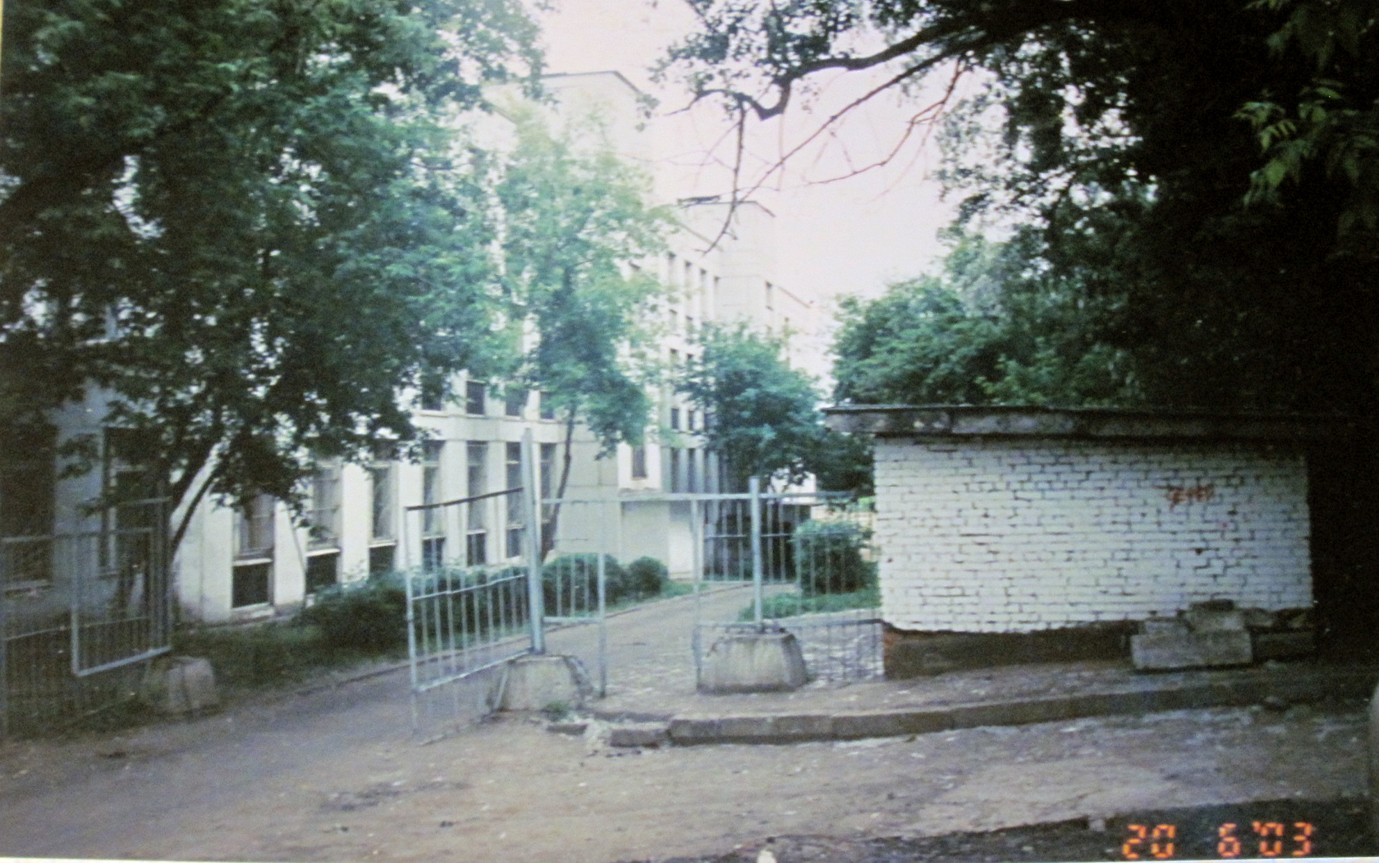 Школа 630, Москва (+ школьный сарай), 2003 г. Фотография примечательна также тем, что на ней видны остатки старой улицы Зелёные Горы (проходит через ворота, при строительстве школы проезд был спрямлён и заужен). Улица официально упразднена не была, но с карт исчезла.